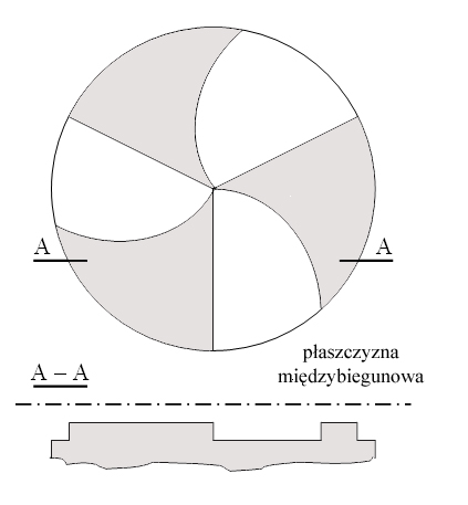 Schemat biegunów elektromagnesu w cyklotronie izochronicznym (z azymutalną modulacją pola).